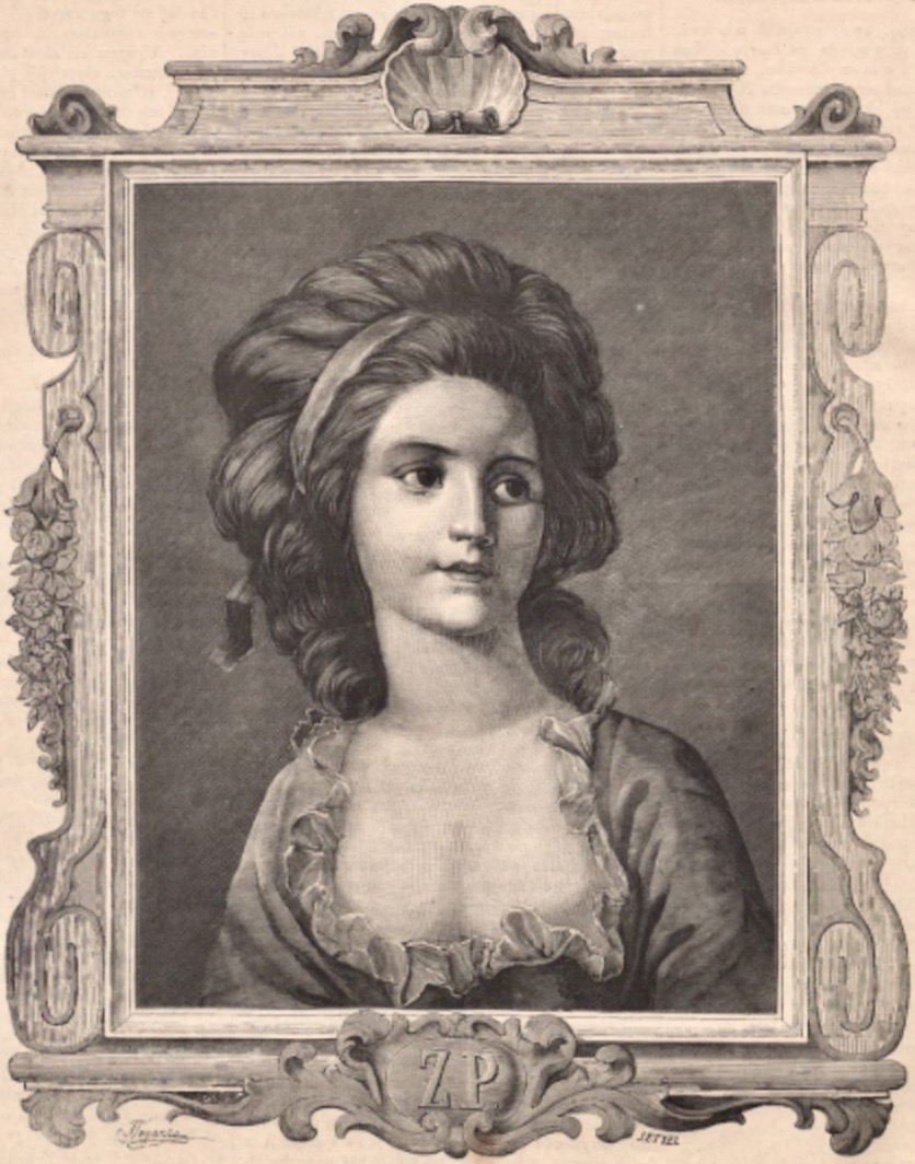 Reproduktion eines Porträts der "Schönen Bithynierin" Zofia Potocka geschiedenen de Witte (1760–1822)